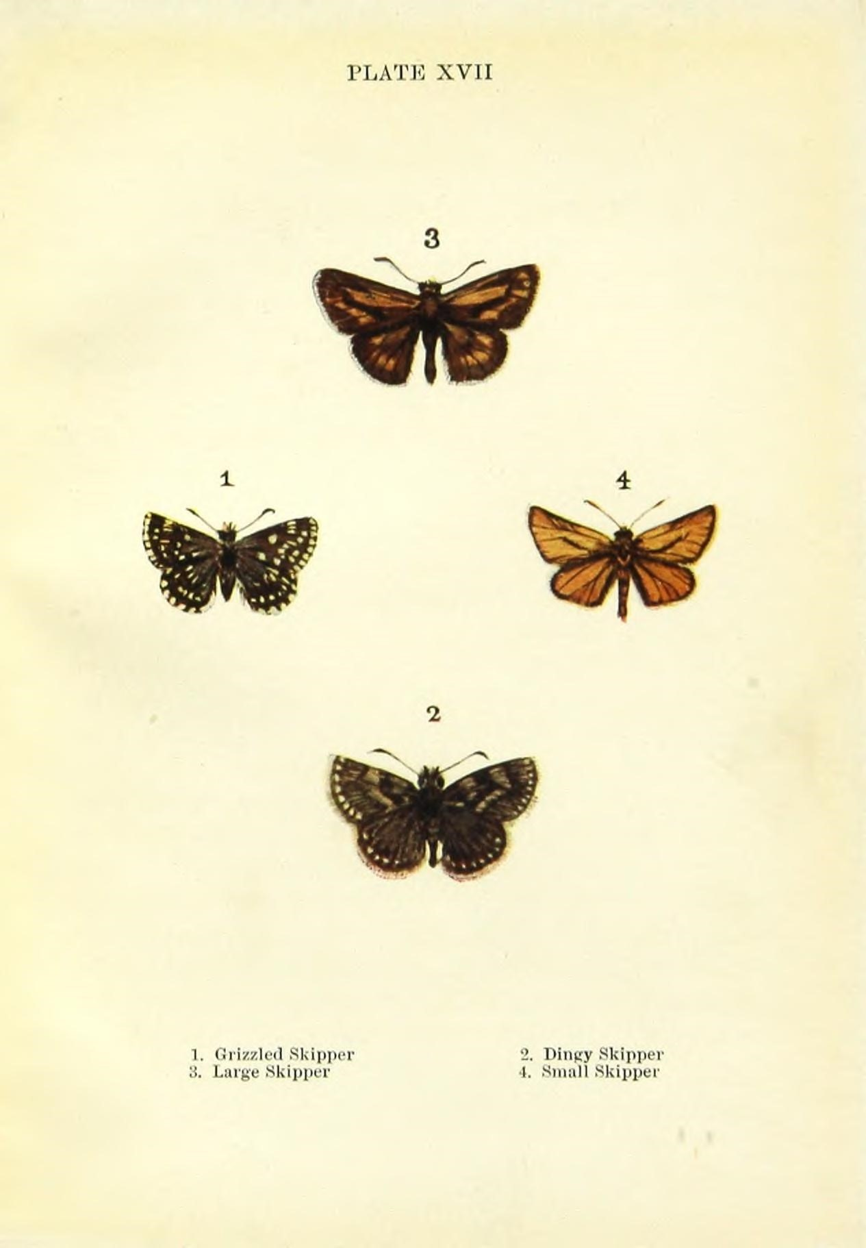 l'LATU XVII .._^- w w 1, Grizzled Skipper 2, Din^ry Skipper 8. Large Skipper \. Small Skipper